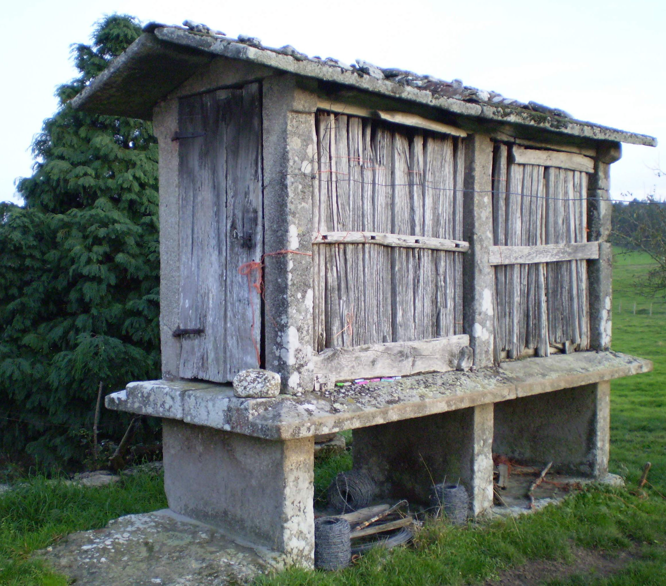 Hórreo tipo mahía, de dous claros, sobre rectangulares. Porta penal e con cuberta de laxes elaboradas, sobre as que se se colocou tella do país. Ubicado no lugar de Baldriz, parroquia de Reboredo no concello de Antas de Ulla (Lugo).